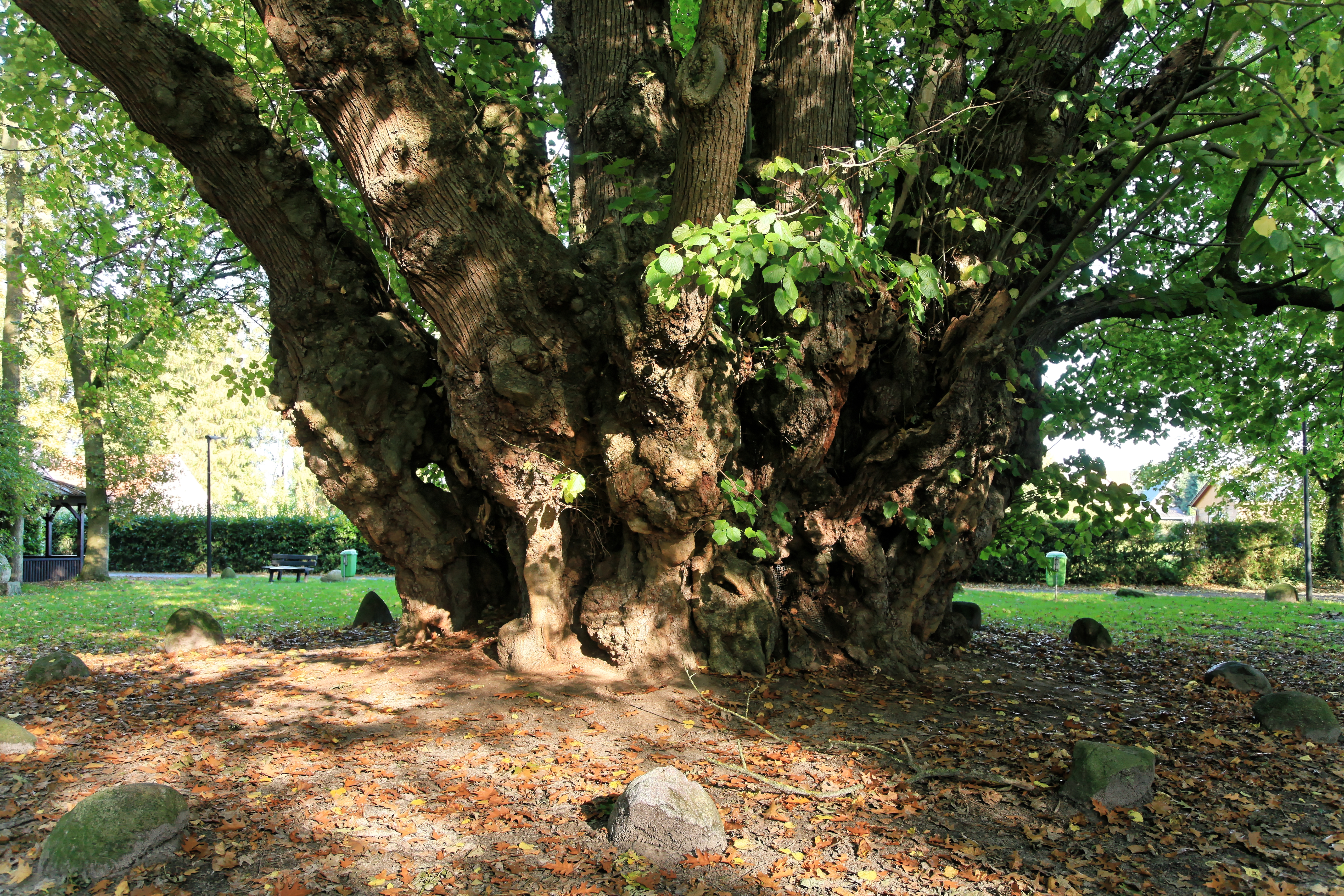 Riesenlinde oder 1000jährige Linde, Pinnincks-Allee in Heede (Emsland)